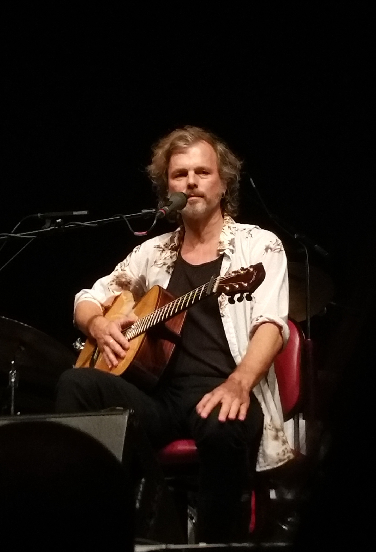 Dreiviertelblut am 3. Oktober 2018 im Zirkus Krone, Gerd Baumann